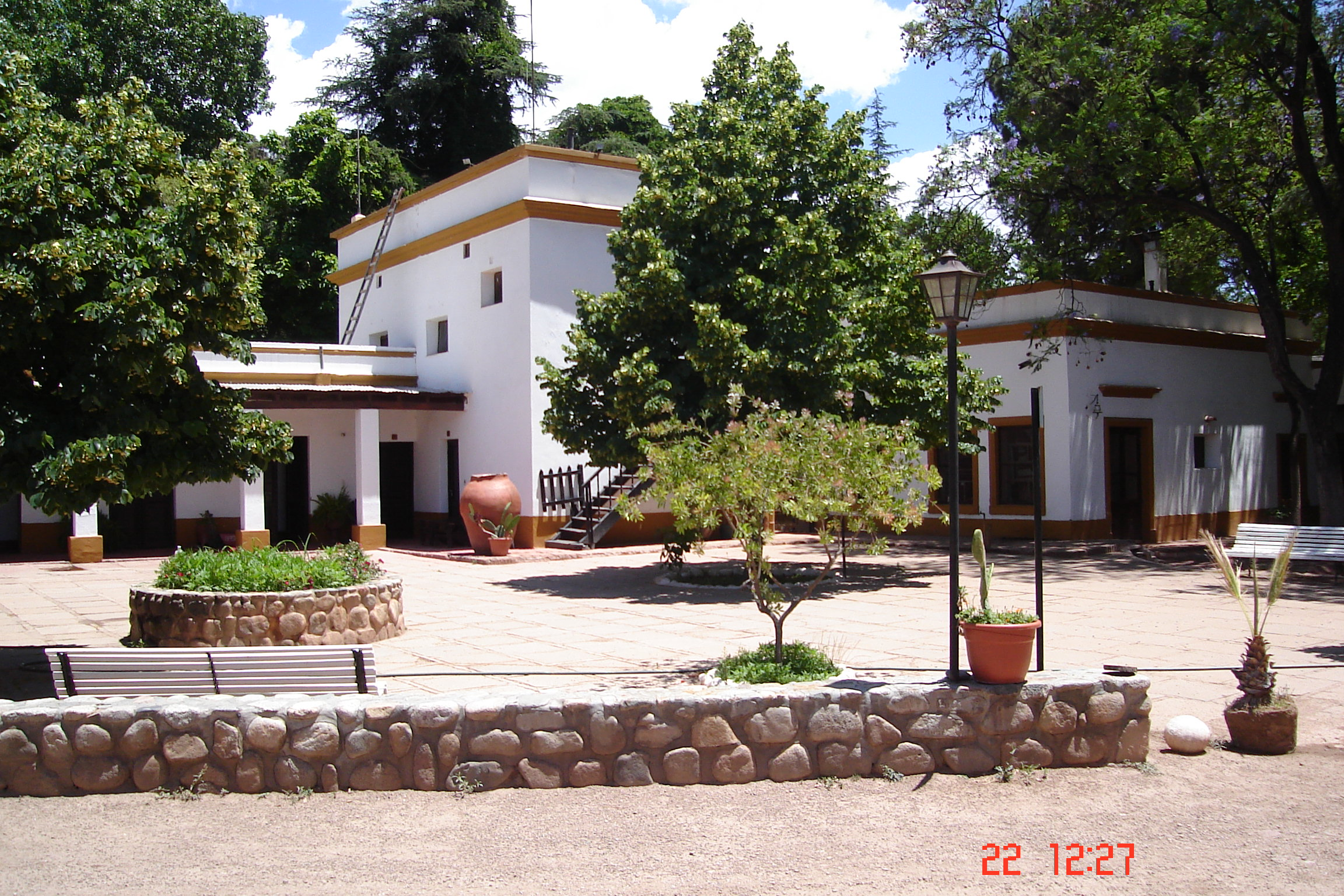 Fotografía de Samay Huasi, Chilecito (Argentina), tomada en noviembre de 2005.